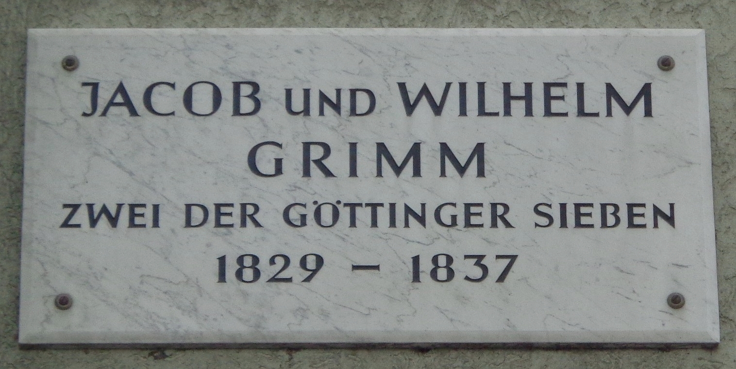 Göttinger Gedenktafel für die Germanisten Jacob Grimm und Wilhelm Grimm (Goetheallee 6)